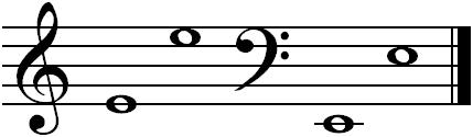 Nuty e na pięciolinii.